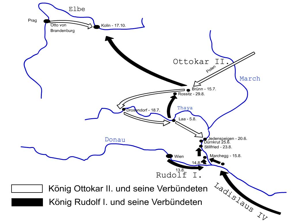 Duernkrut2